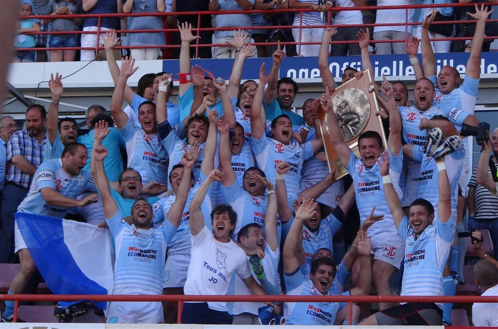 le bouclier